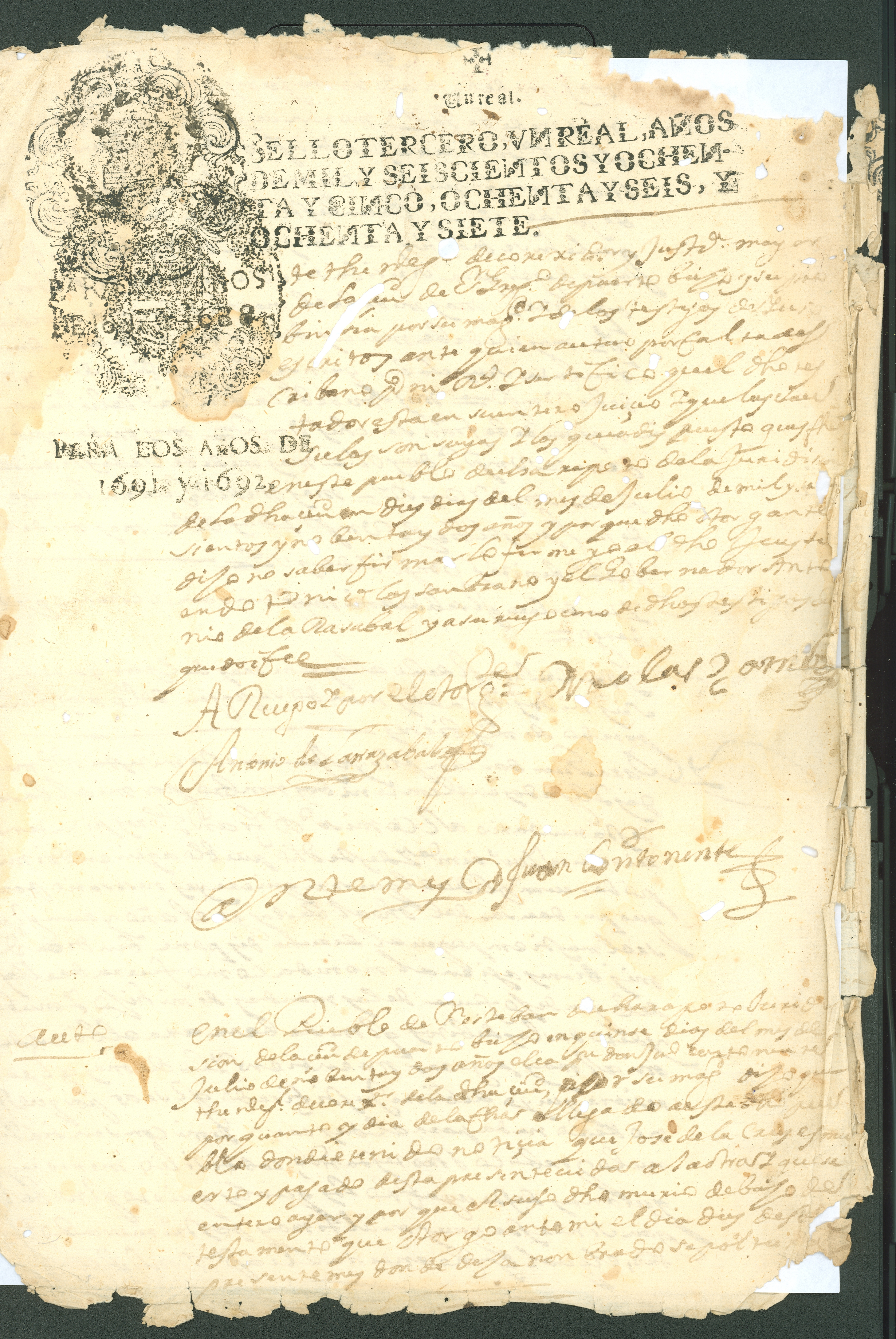 TESTAMENTO DE JOSEPH DE LA CRUZ VECINO EN EL PUEBLO DE CHARAPOTÓ JURISDICCIÓN DE LA CIUDAD DE PUERTO VIEJO, EN EL CUAL DEJA NOMBRADOS SUS HEREDEROS, ALBASEAS, DEUDORES Y OTROS ASUNTOS. (San Esteban de Charapotó, 10.07.1692).